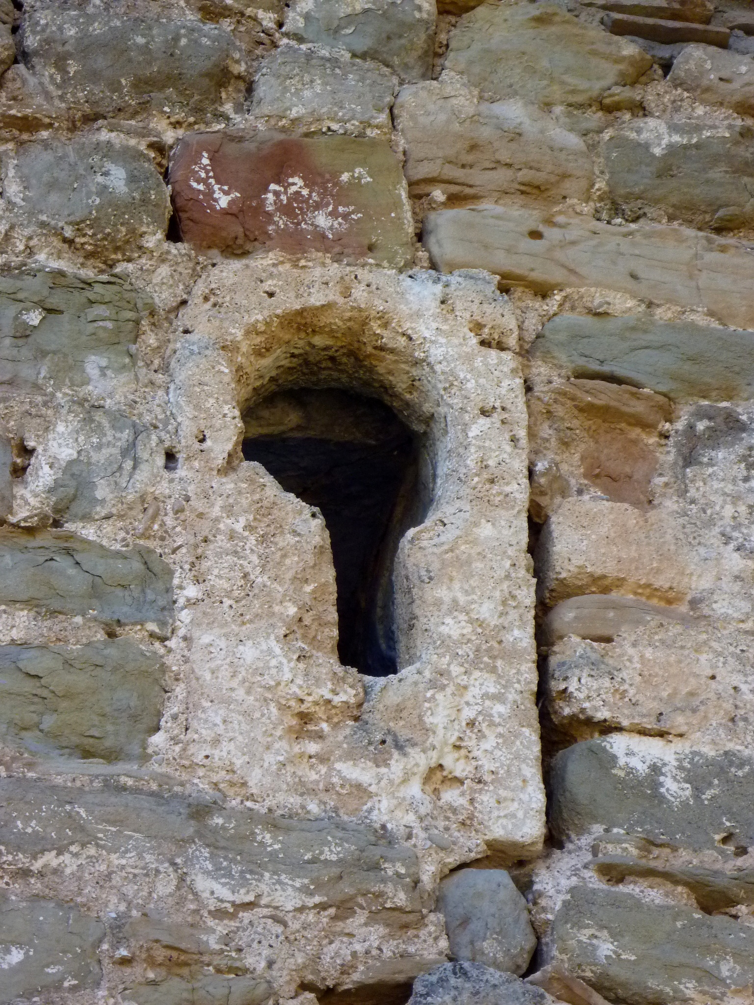 Santa Magdalena del Sàlzer (Odèn): Finestra a la façana